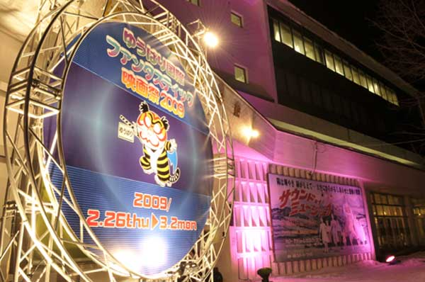 Yubari City hall